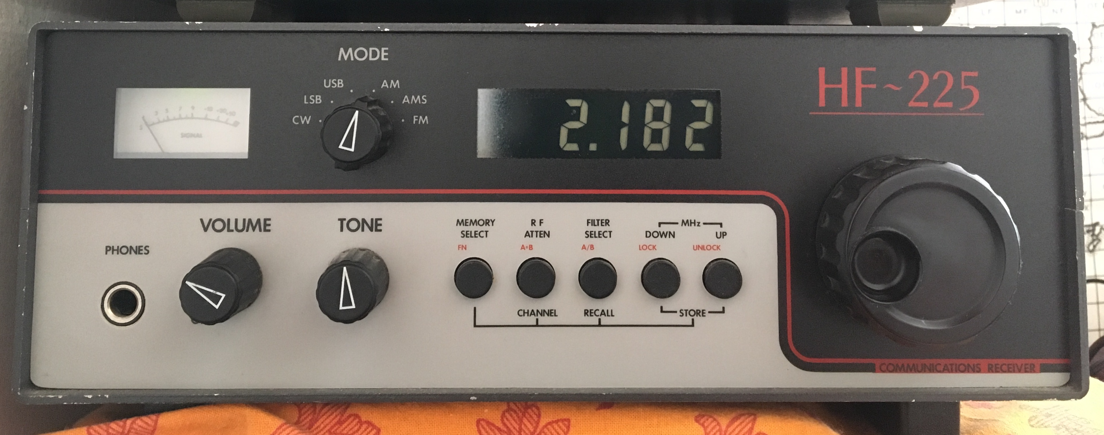 Récepteur sur 2182 kHz utilisé pour l'écoute des messages de détresse en AM et de sécurité et vie humaine. Récepteur Lowe HF225, 30kHz à 30MHz.